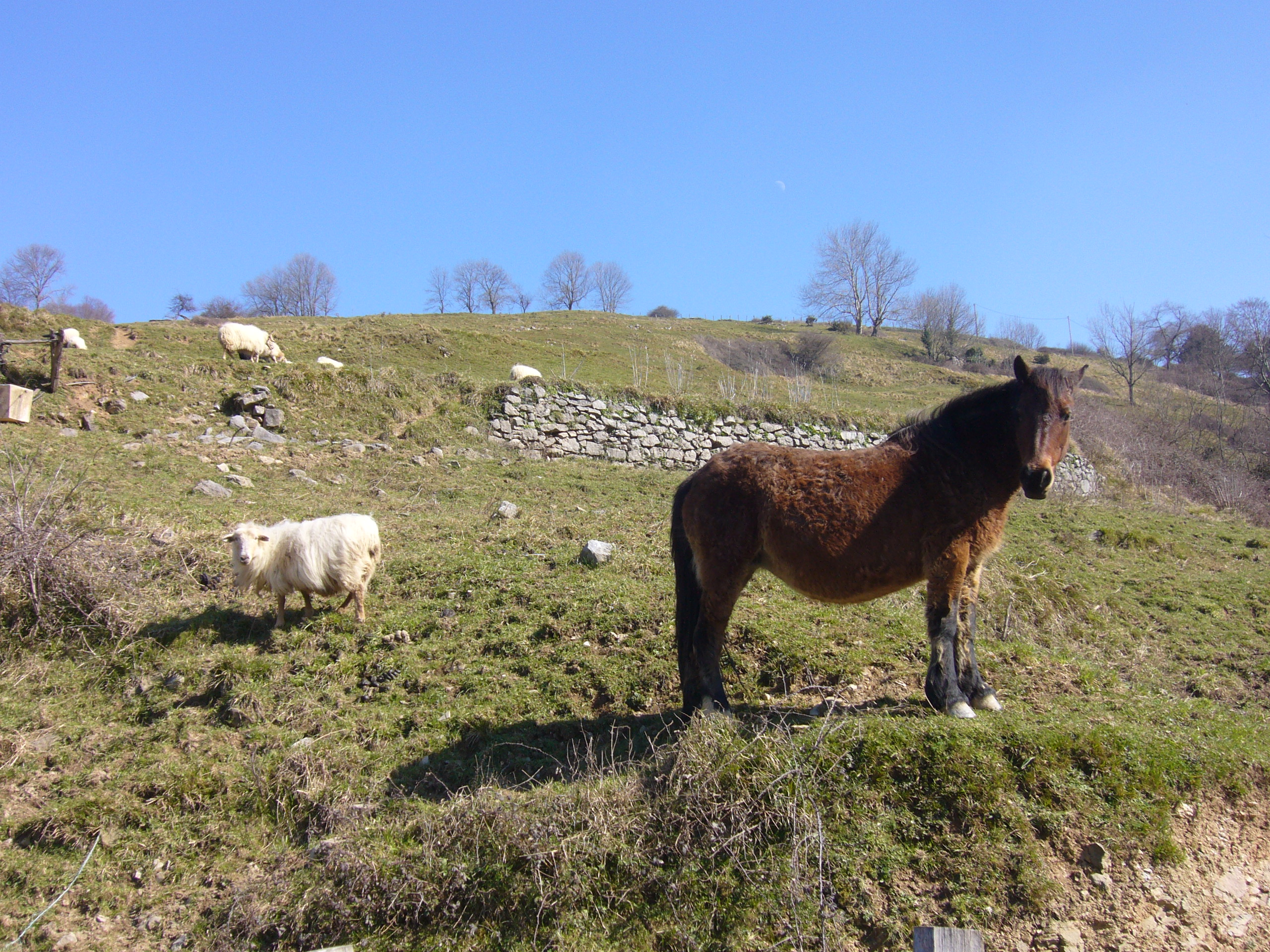 Euskal Herriko mendiko zaldia eta ardi latxa